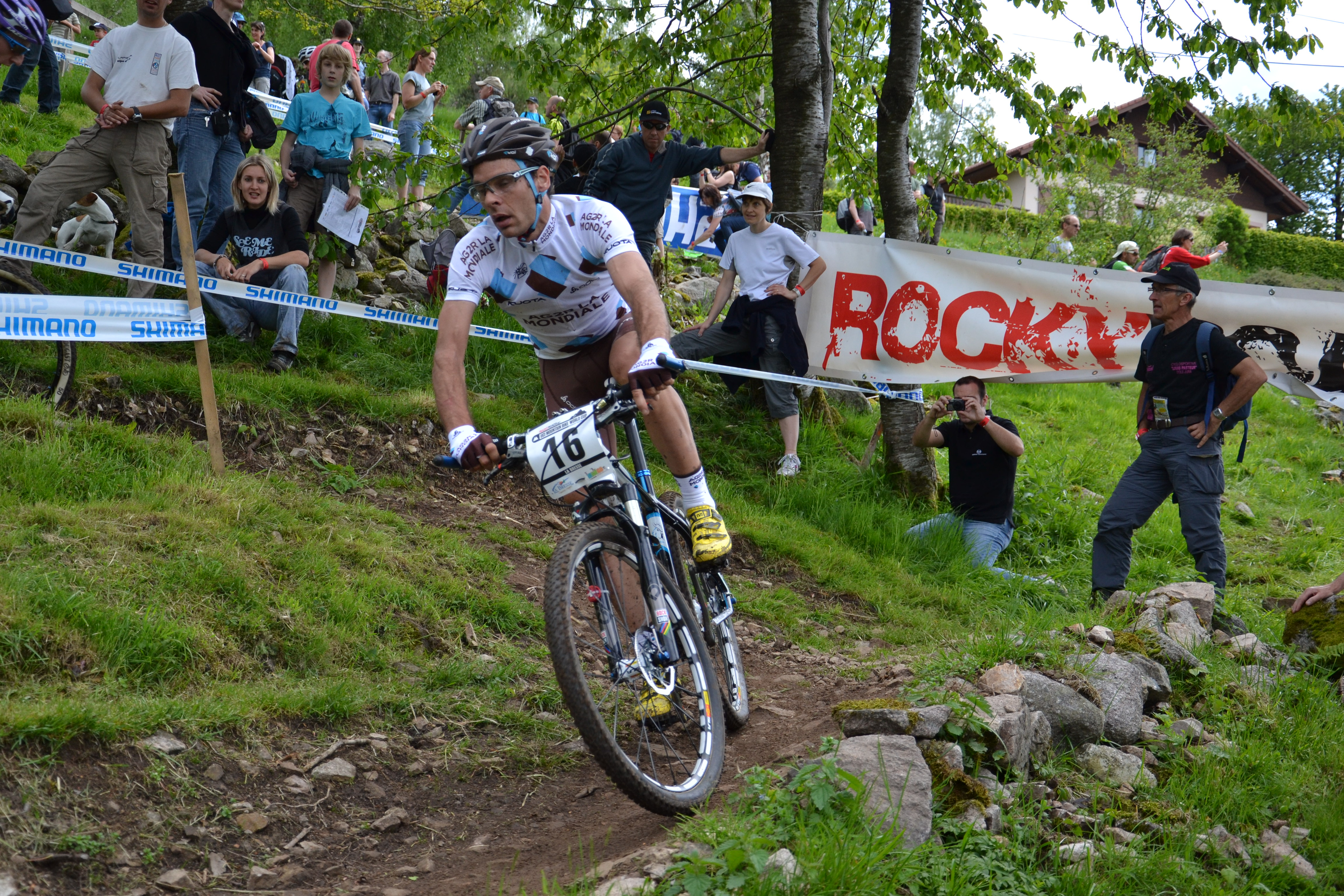 Jean-Christophe Péraud lors de la 4e manche de la coupe du monde UCI de VTT 2012 à La Bresse (FRA).